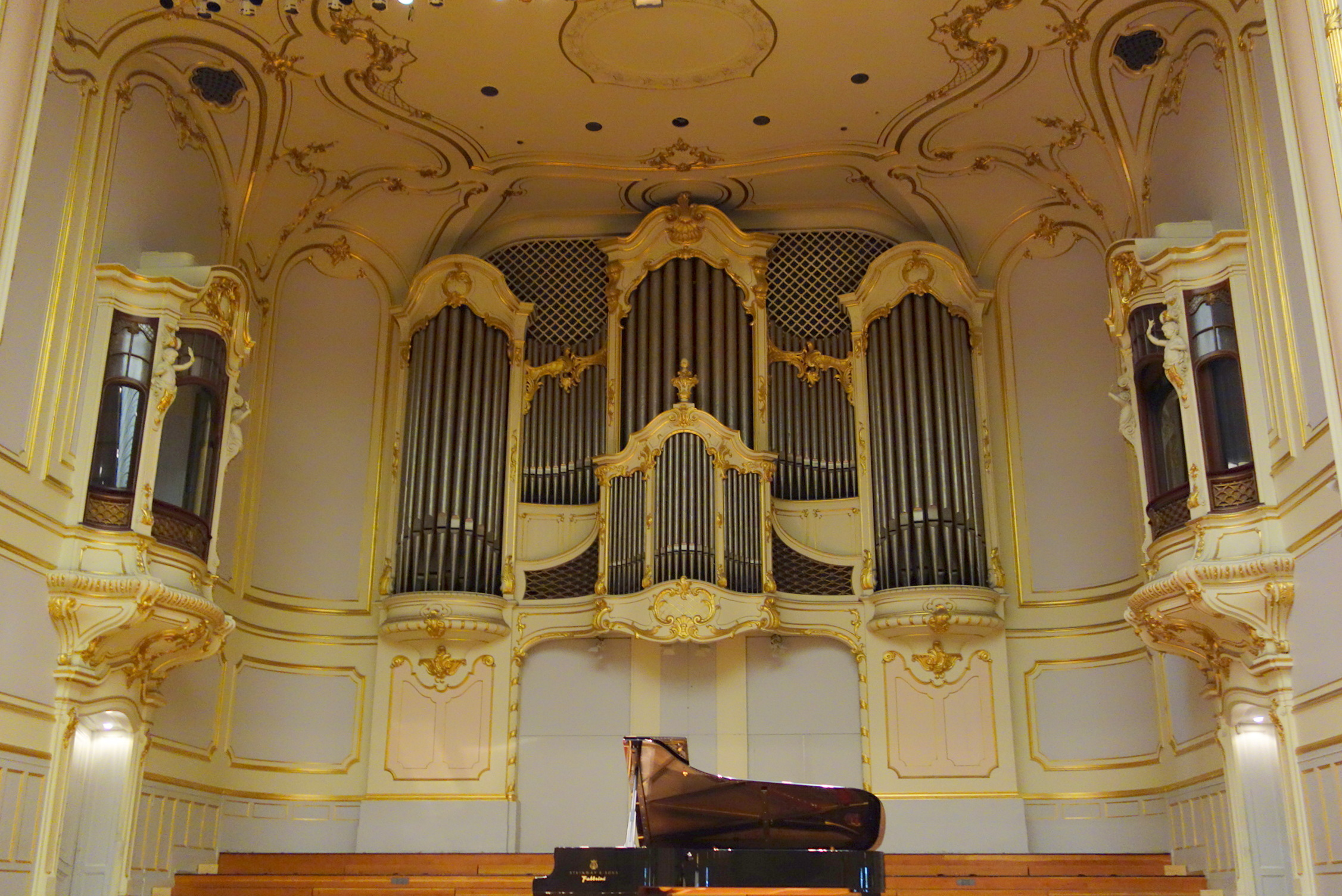 Orgel der Laeiszhalle, Hamburg, Deutschland